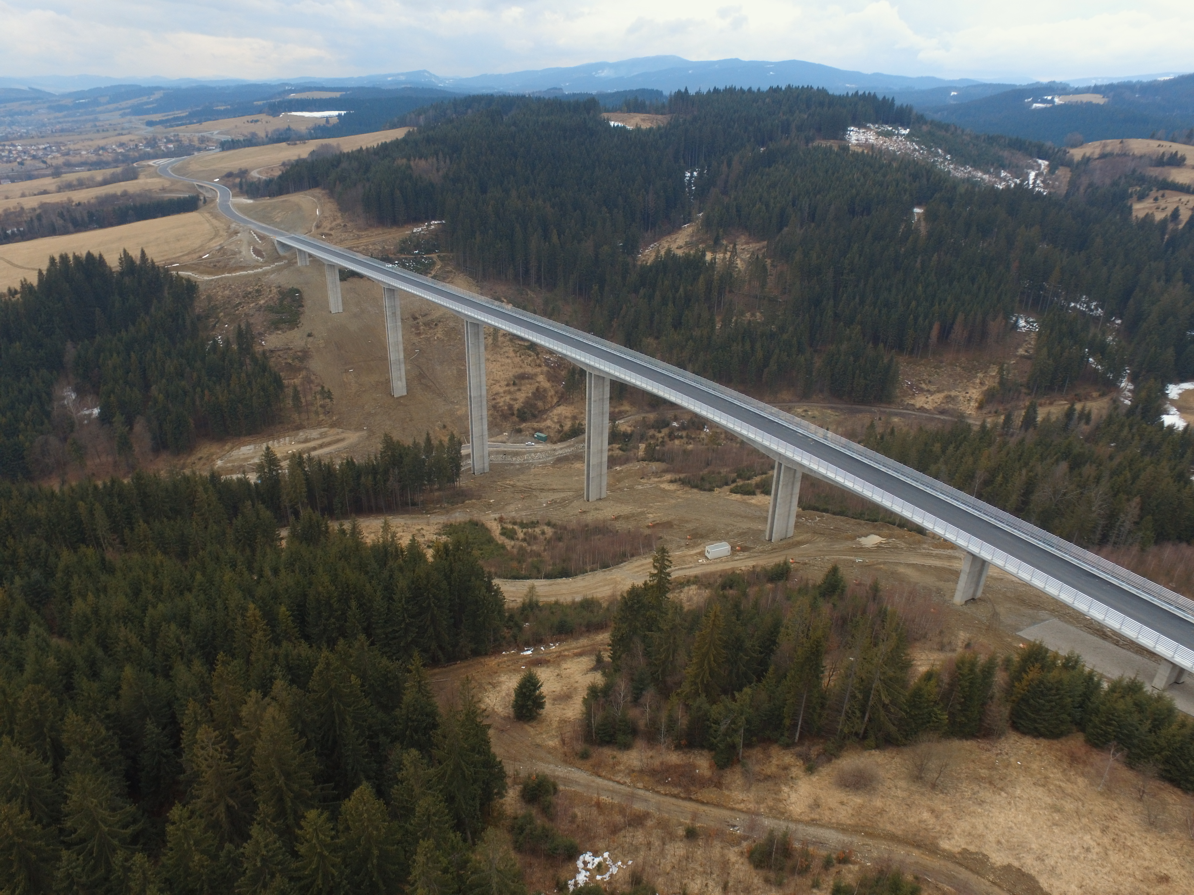 Most Valy z lotu ptaka. Widok w kierunku miejscowości Świerczyniowiec. 06.03.2017